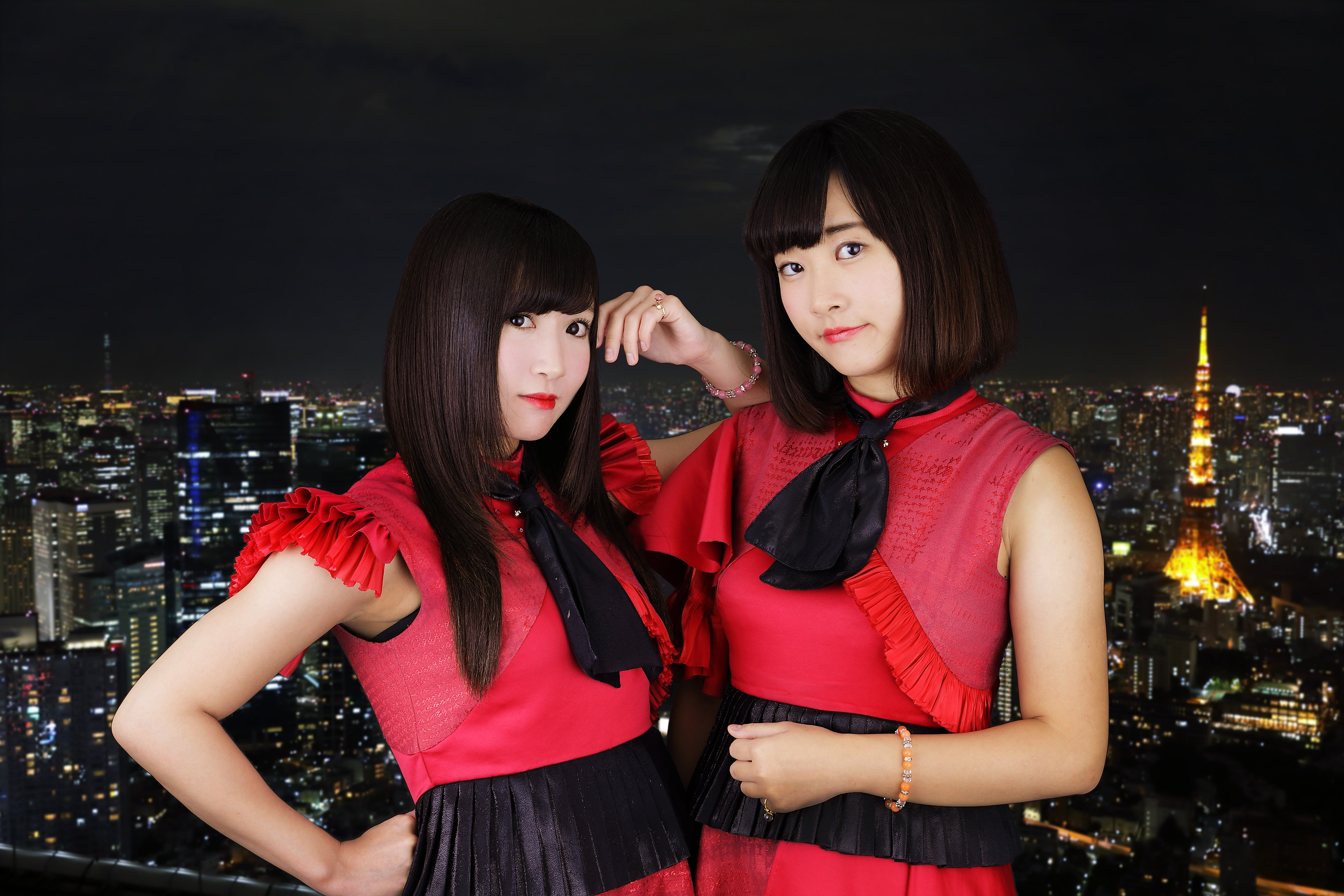 TJ(トーンジュエル) アーティスト写真